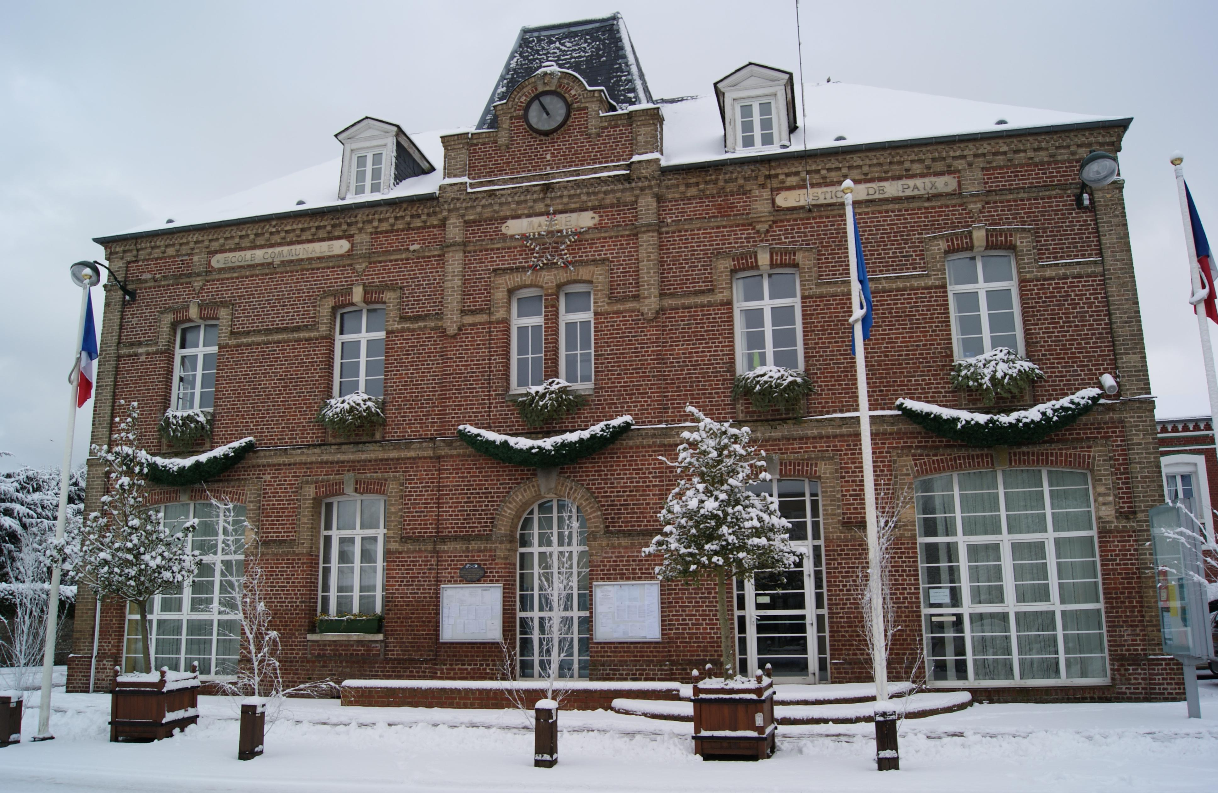 Mairie d'Offranville (76, Seine maritime) sous la neige.